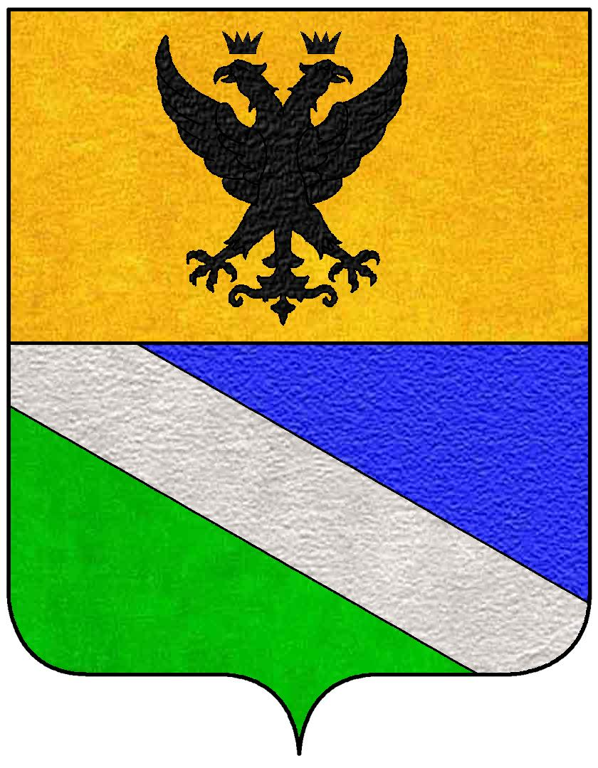 Stemma della famiglia Ottoboni